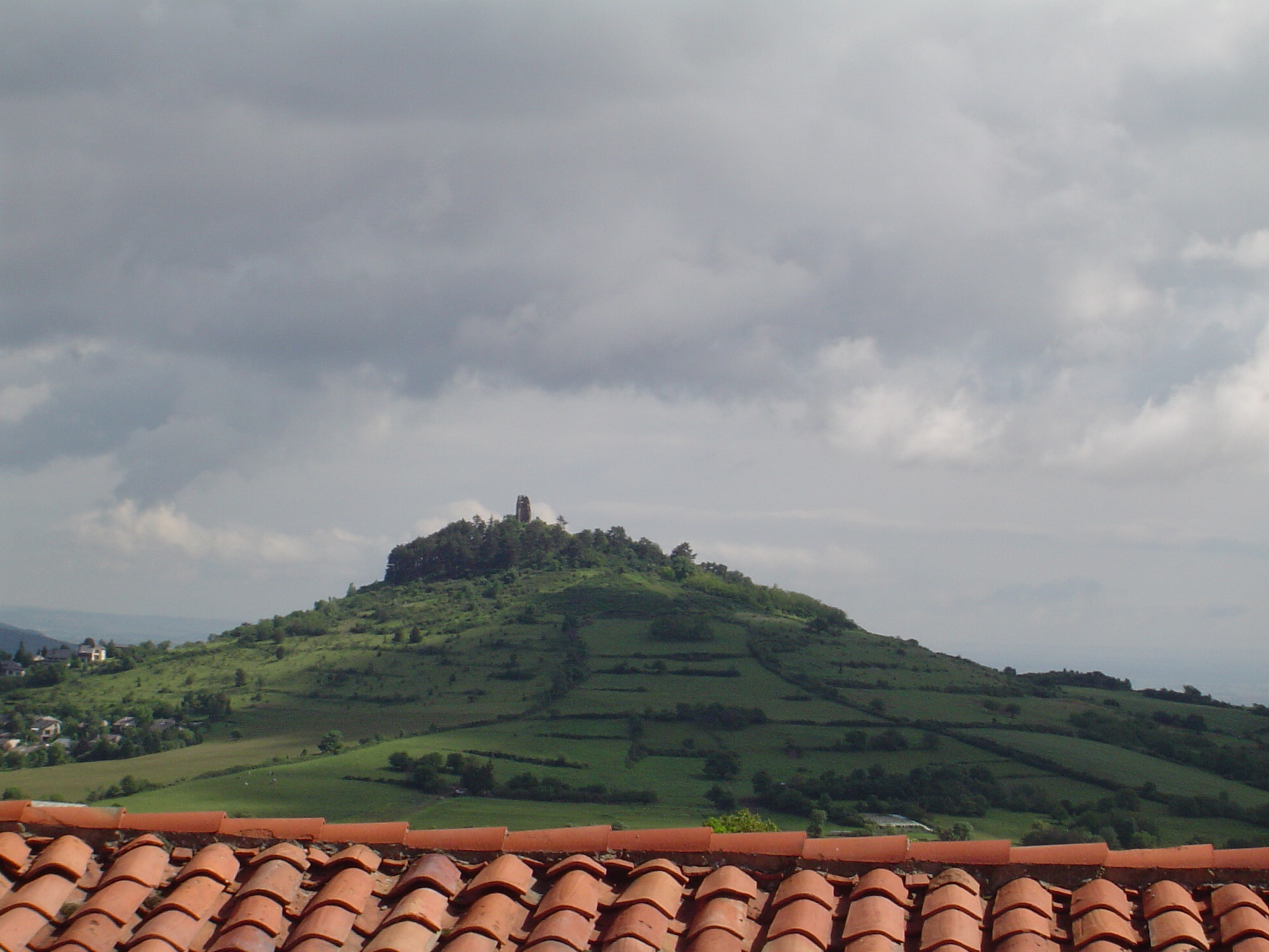 Vue printanière de Montrognon depuis Saulzet-le-Chaud